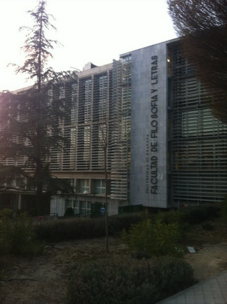 Edificio de la Facultad de Filosofía y Letras de la Universidad de Granada.